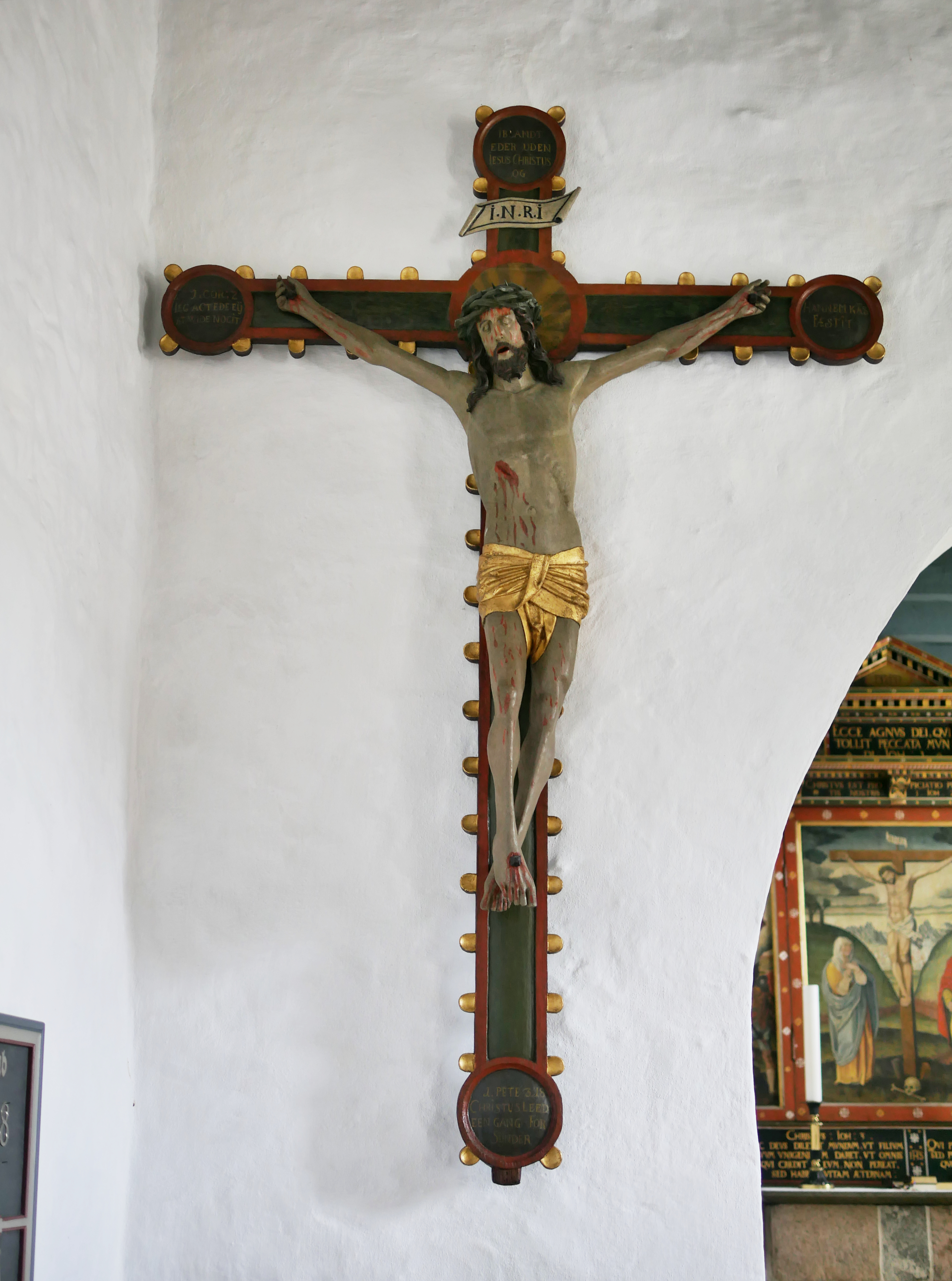 Kirche von Vive am Mariagerfjord (Dänemark, Nord-Jütland)- Erbaut etwa 1250, schöne Innenausstattung: romanischer Taufstein, Renaissacealter, Kanzel aus dem Historismus, moderne Orgel Barockes (Renaissance?) Kreuz neben dem Triumpfbogen